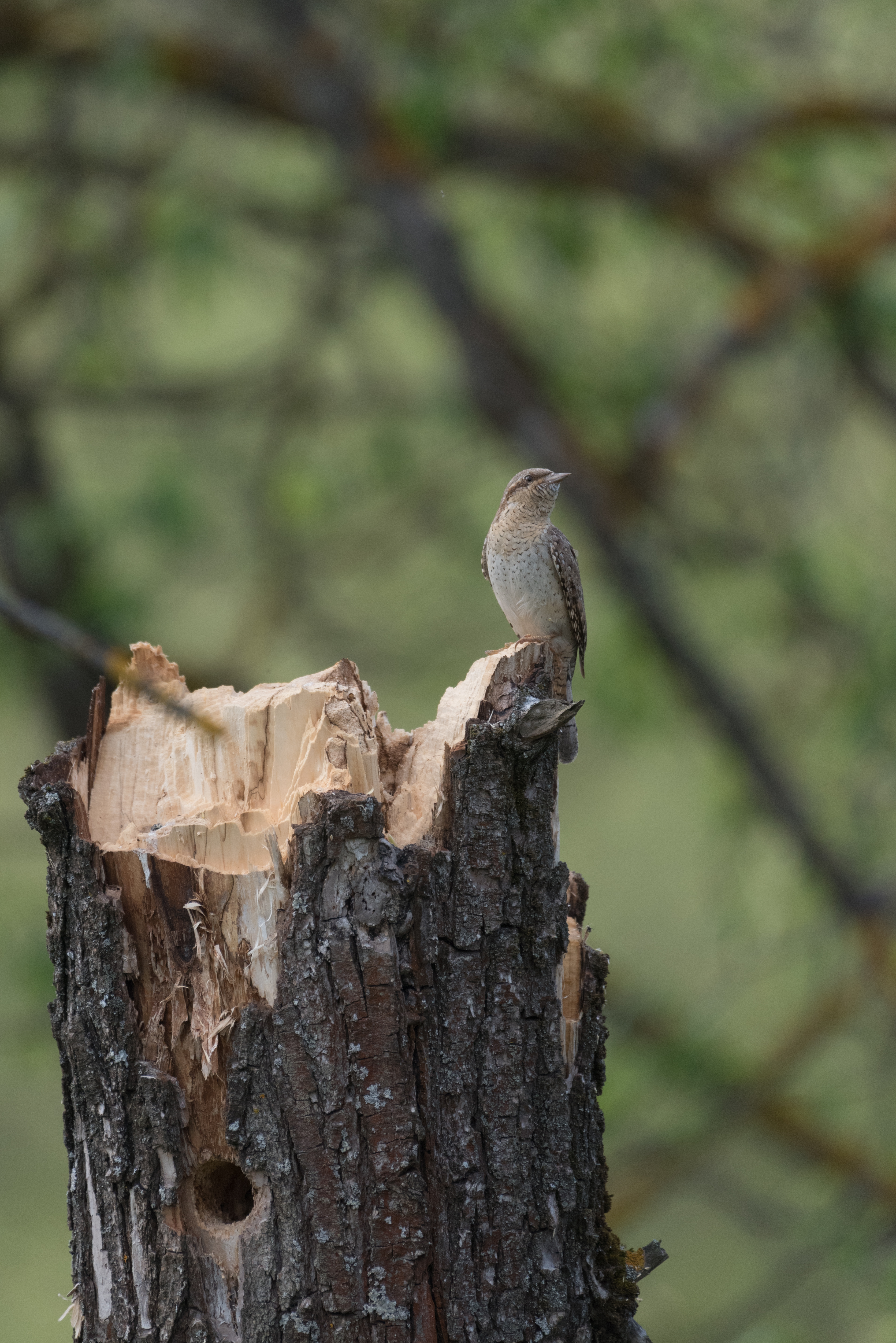 Вертишейка. Май. Боровск.